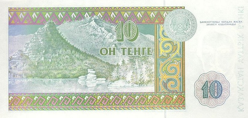 10 тенге 1993 года